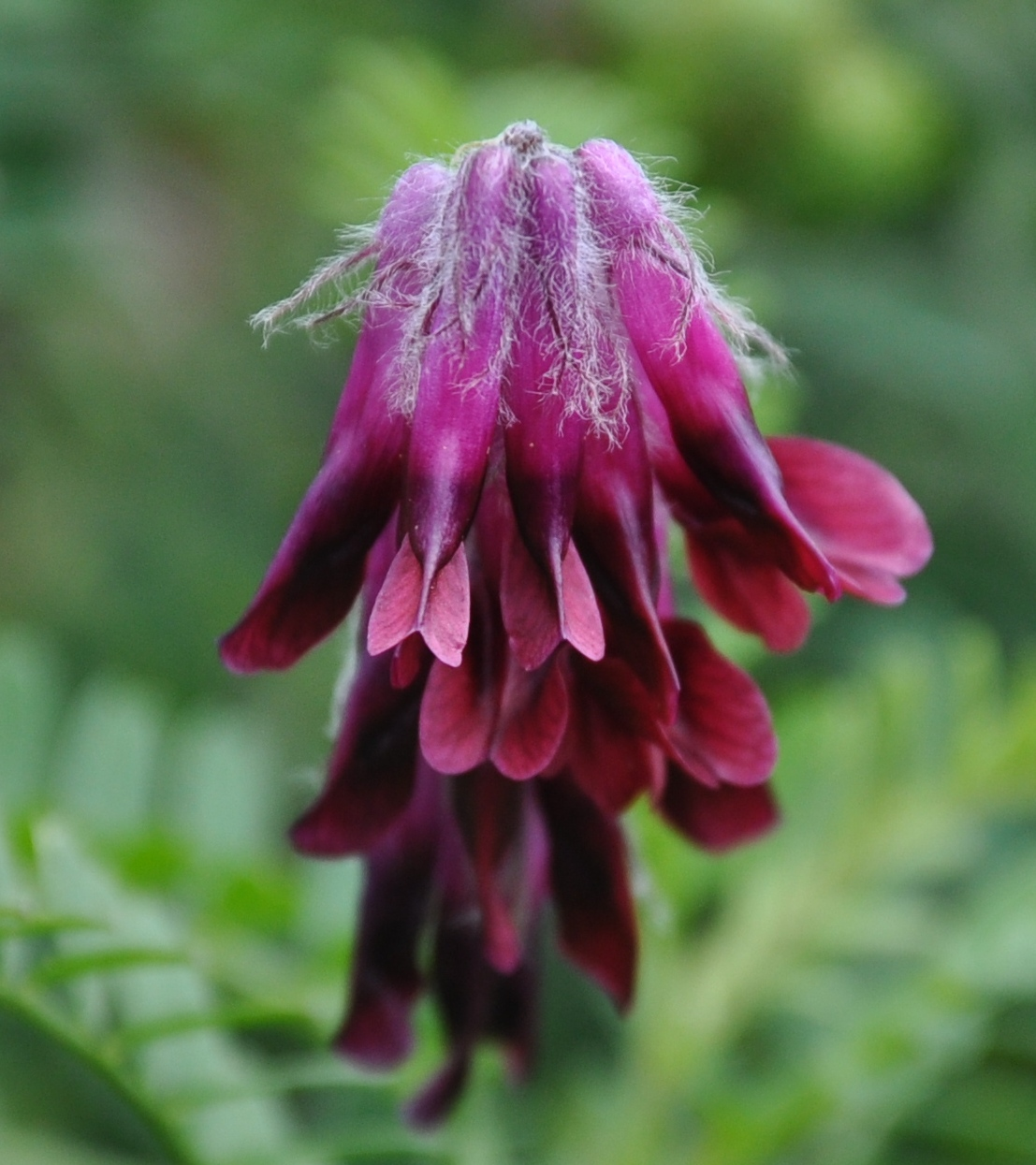 Arveja roja (Vicia benghalensis) Ceuta, España.